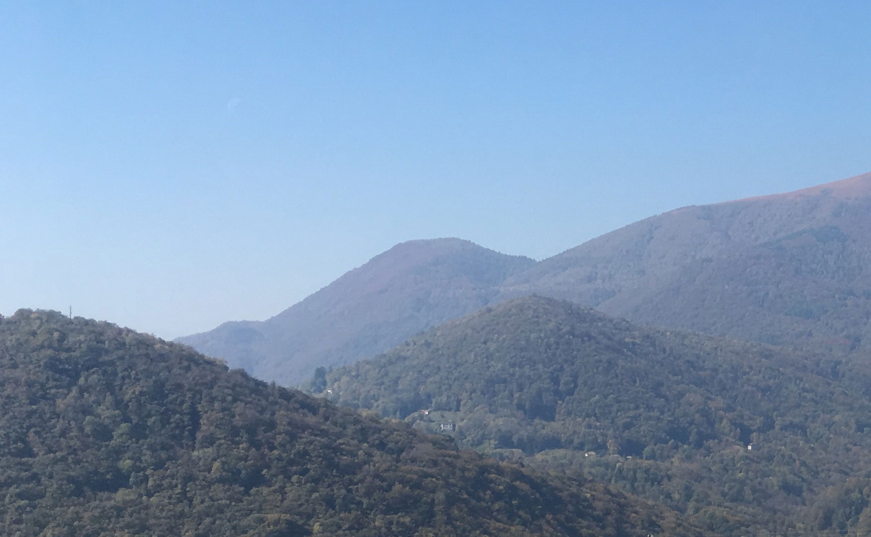 Im Zentrum am Horizont der Monte Rogoria, rechts davon der Cücch, im Vordergrund links der Sciaroni, rechts der Sélva, von Iseo TI aus fotografiert